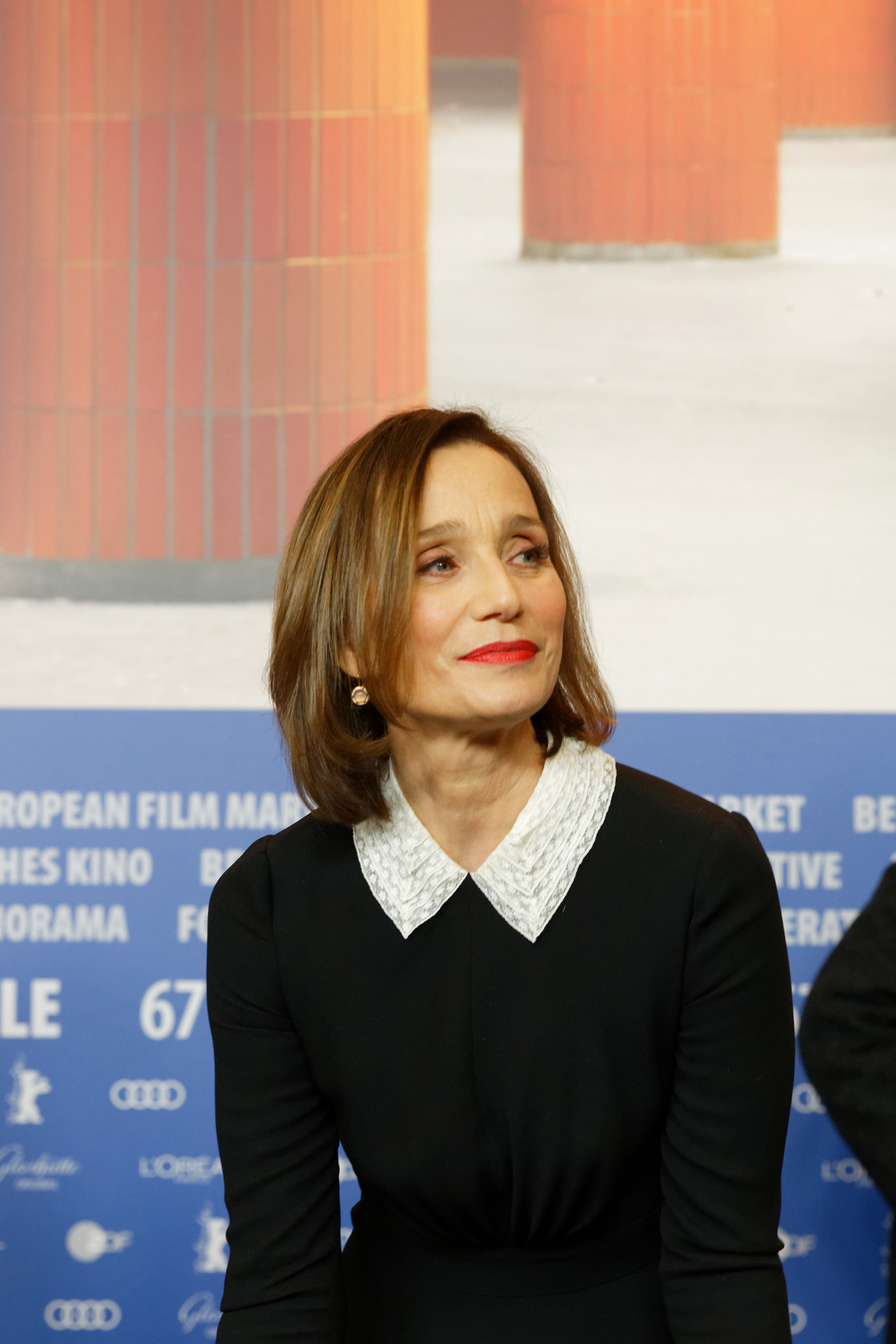 Kristin Scott Thomas bei der Pressekonferenz zu The Party bei der Berlinale 2017